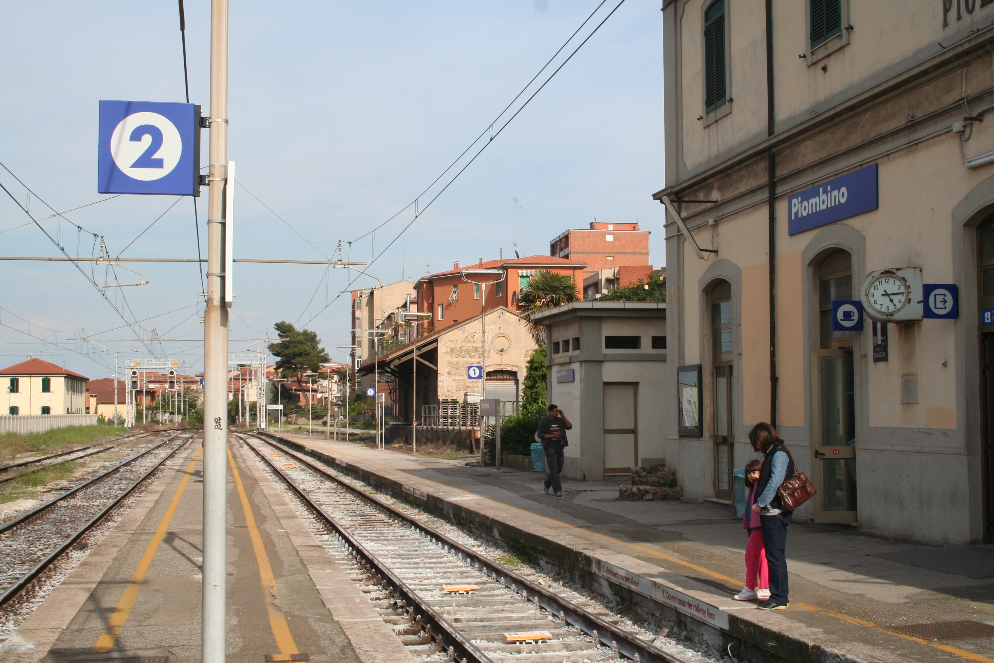 Stazione di Piombino. Piazzale binari e banchina del secondo binario